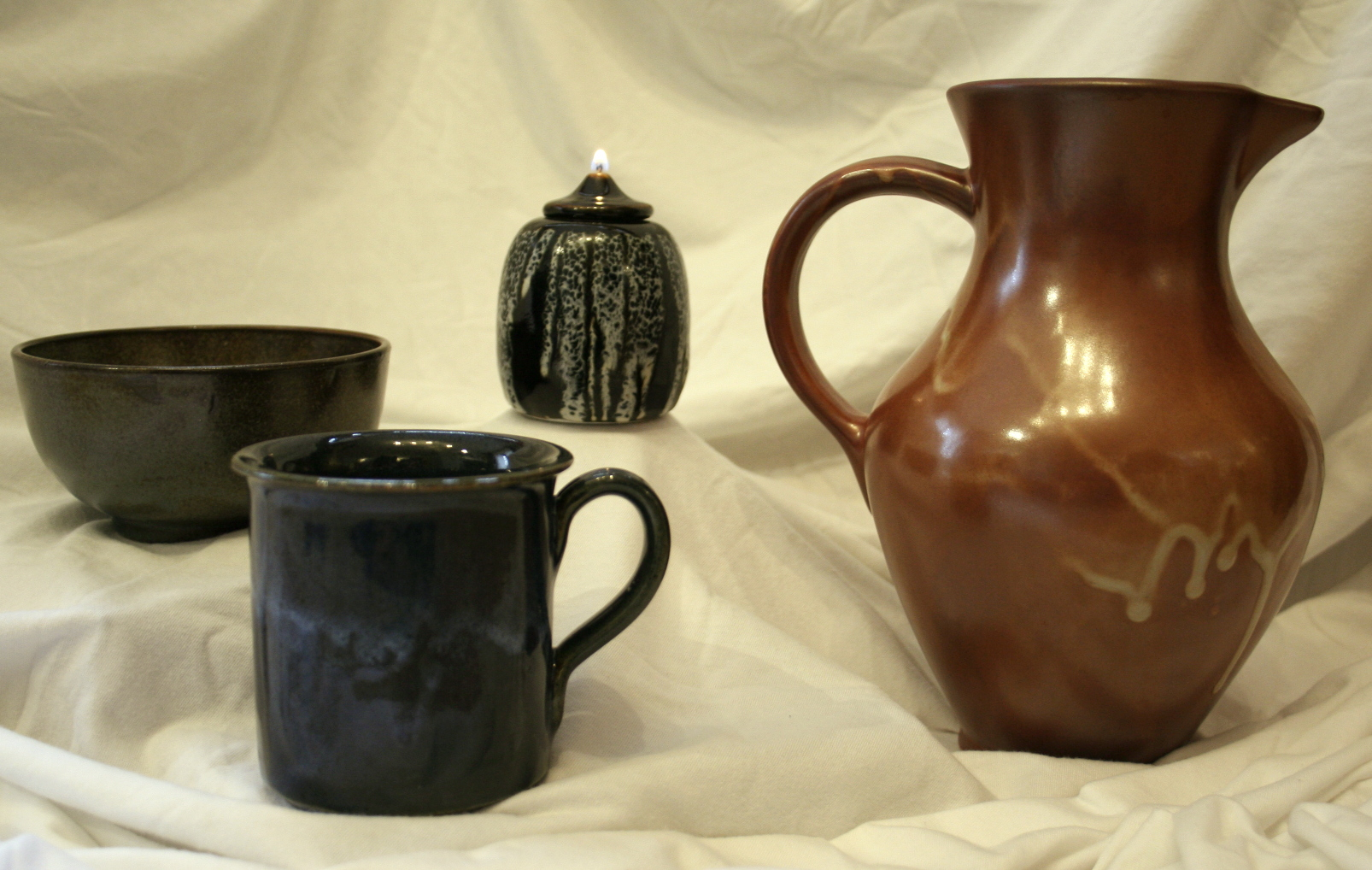 Stoneware from the Communauté de Taizé